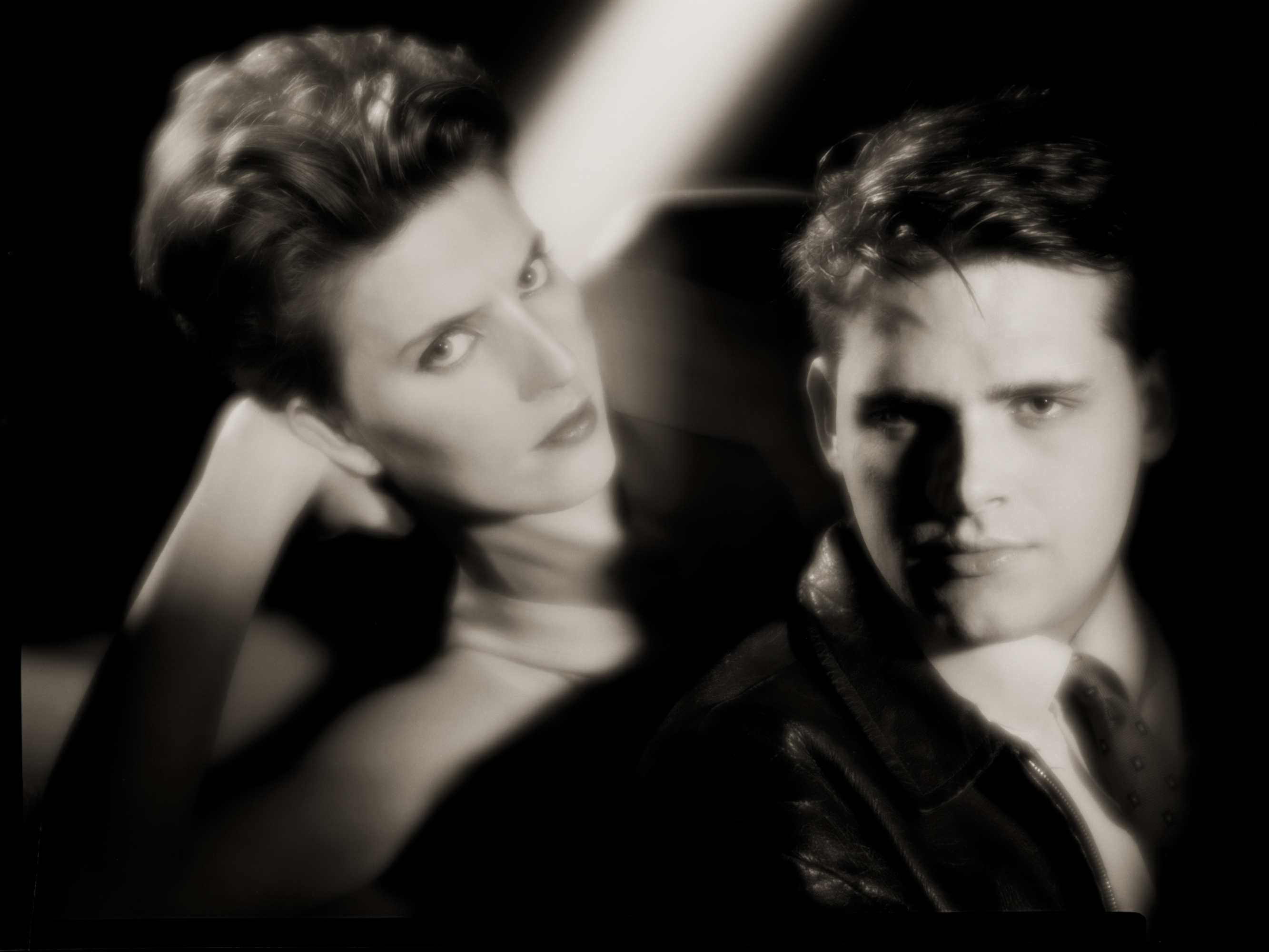 Bilden föreställer medlemmarna i den svenska musikgruppen Mockba Music